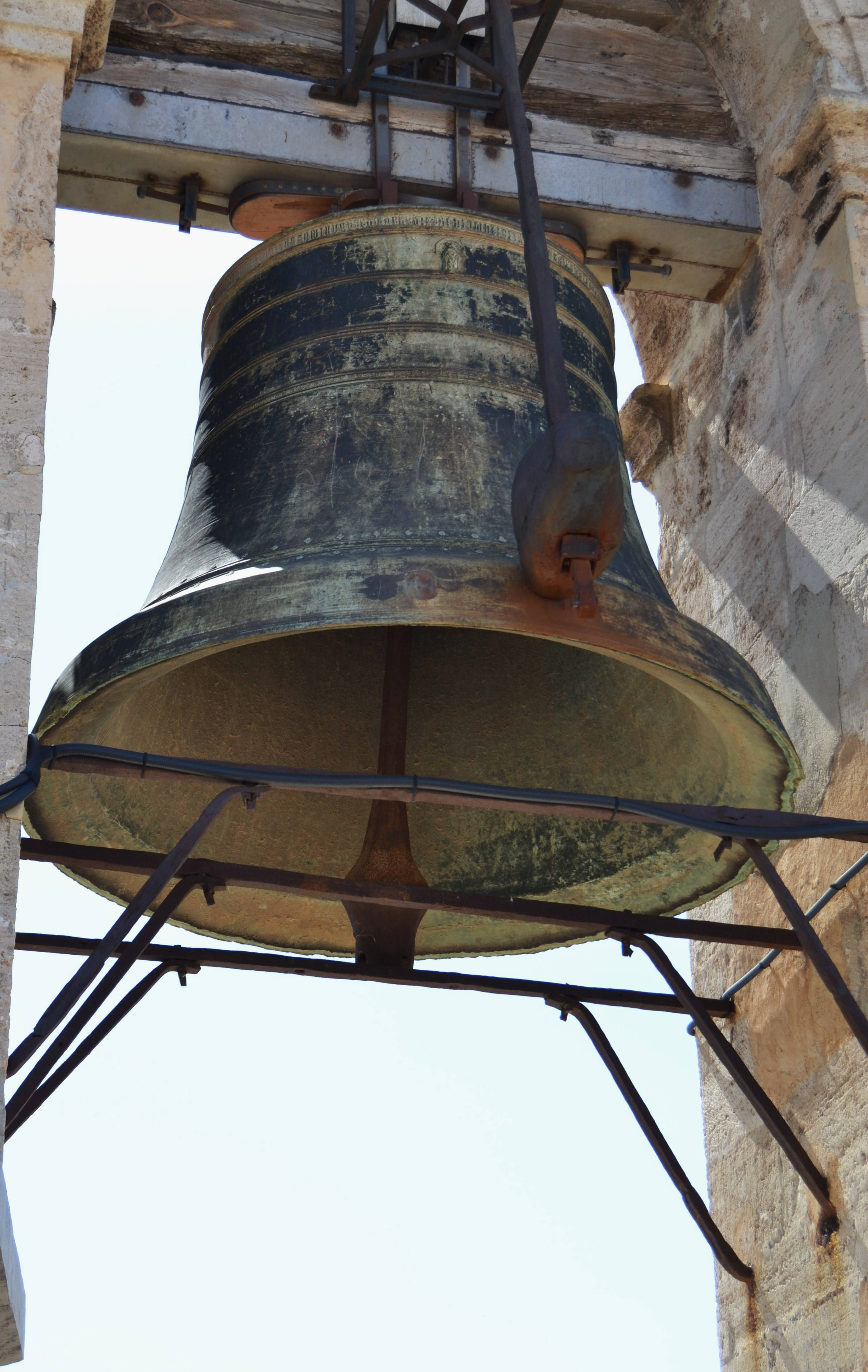 Campana Micalet, 1539, Micalet de València.